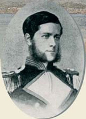 Karl von Eisendecher german diplomat